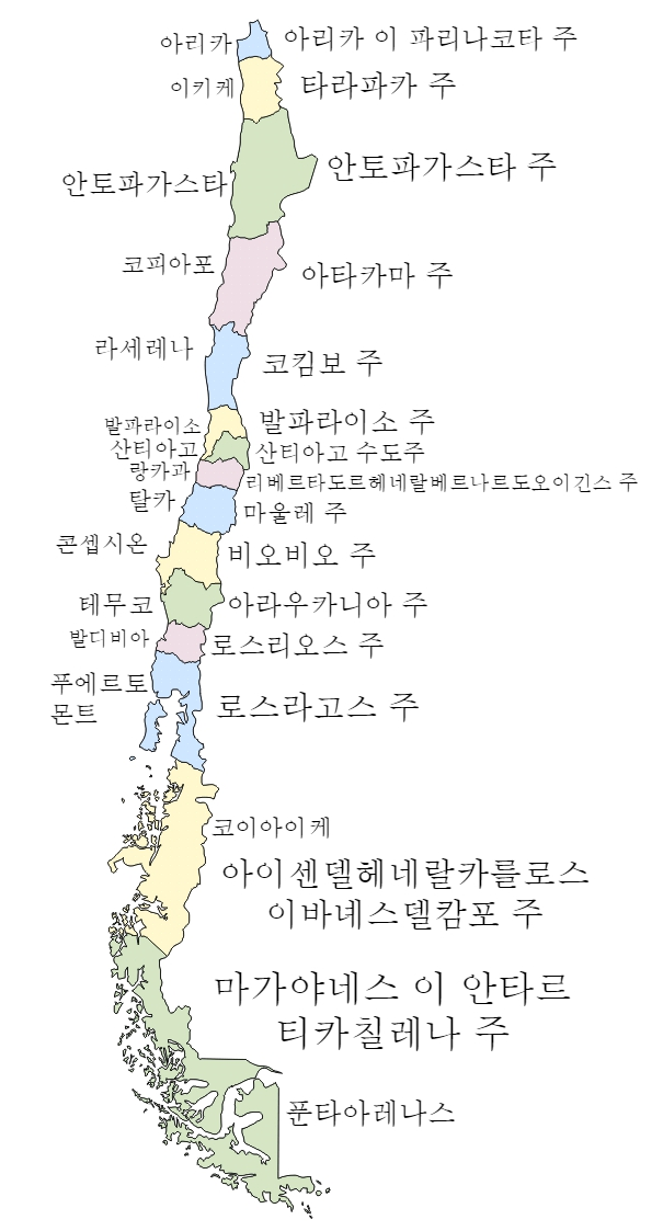 칠레의 도시 및 지역지도